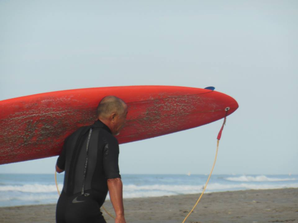 赤いサーフボードを担ぐサーファー Surfer and red surfboard at Omotehama beach